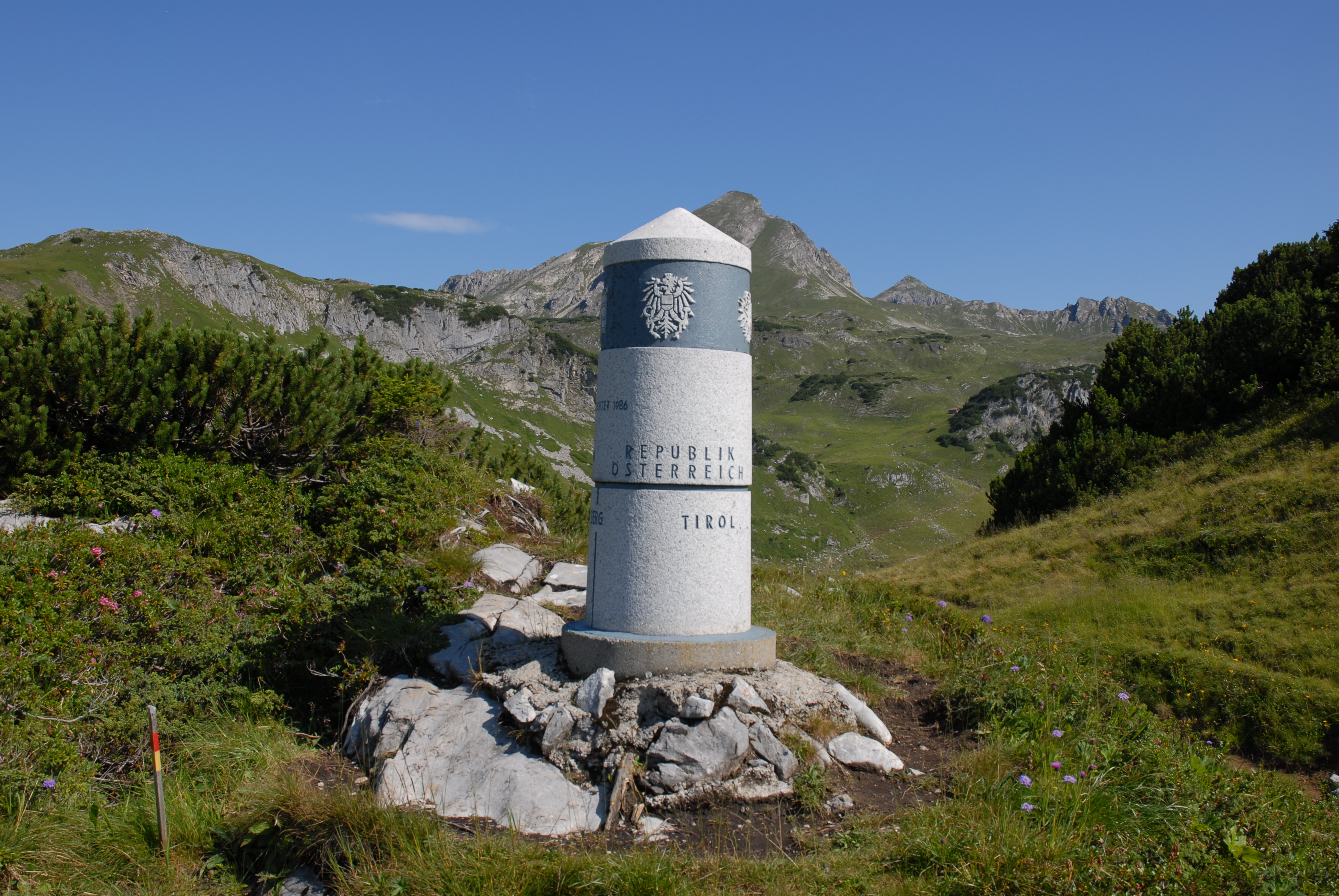 Der Grenzstein 147 steht am südlichsten Punkt Deutschlands an der Grenze zu den österreichischen Bundesländern Vorarlberg und Tirol. Im Hintergrund ist jenseits des oberen Endes des Haldenwanger Tales das Geißhorn zu sehen.